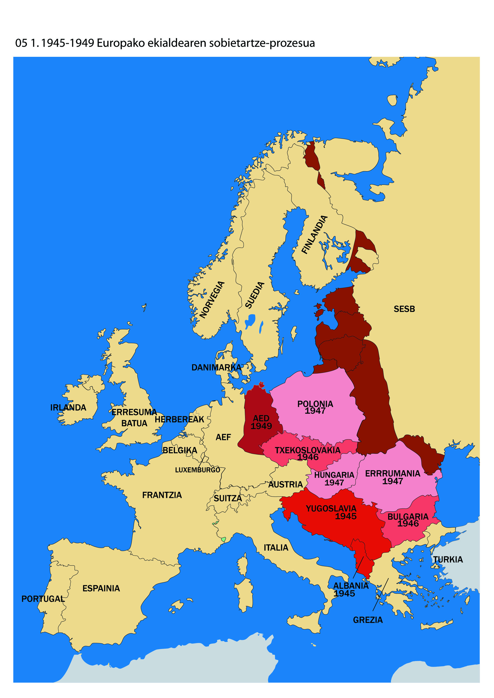 1945-1949 Ekialdeko Europaren sobietartze-prozesua, UEUren liburutik hartua.